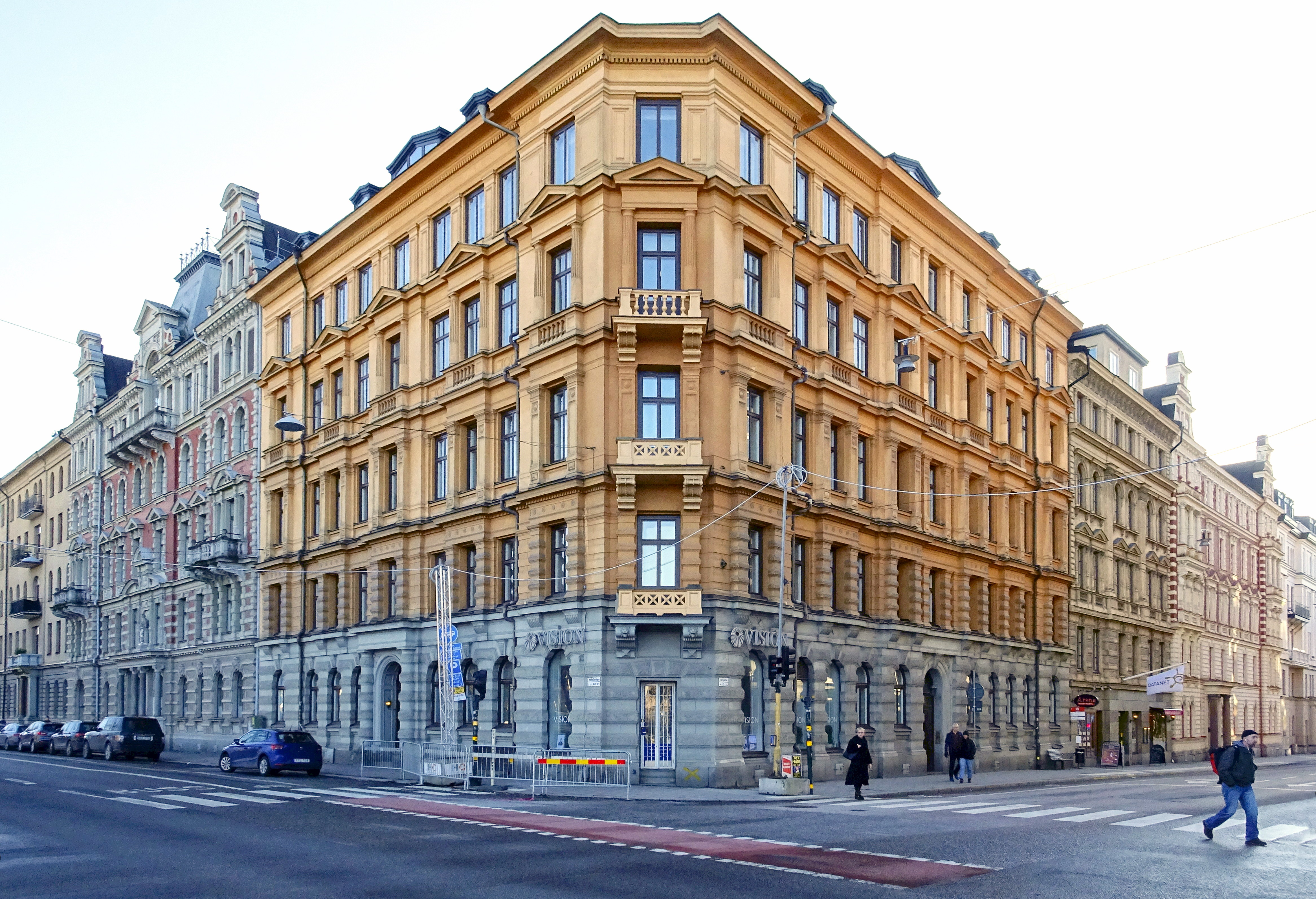 Älgen 14, Valhallavägen, Sturegatan. P. J. Hallström (Byggherre), P. J. Hallström (Byggmästare). Nybyggnadsår 1887 - 1888